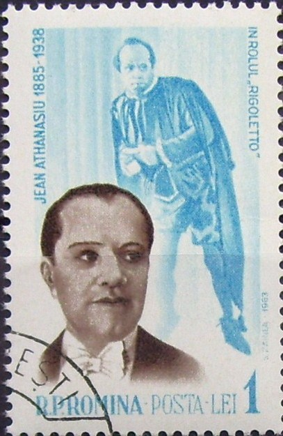 Source: Post of Romania